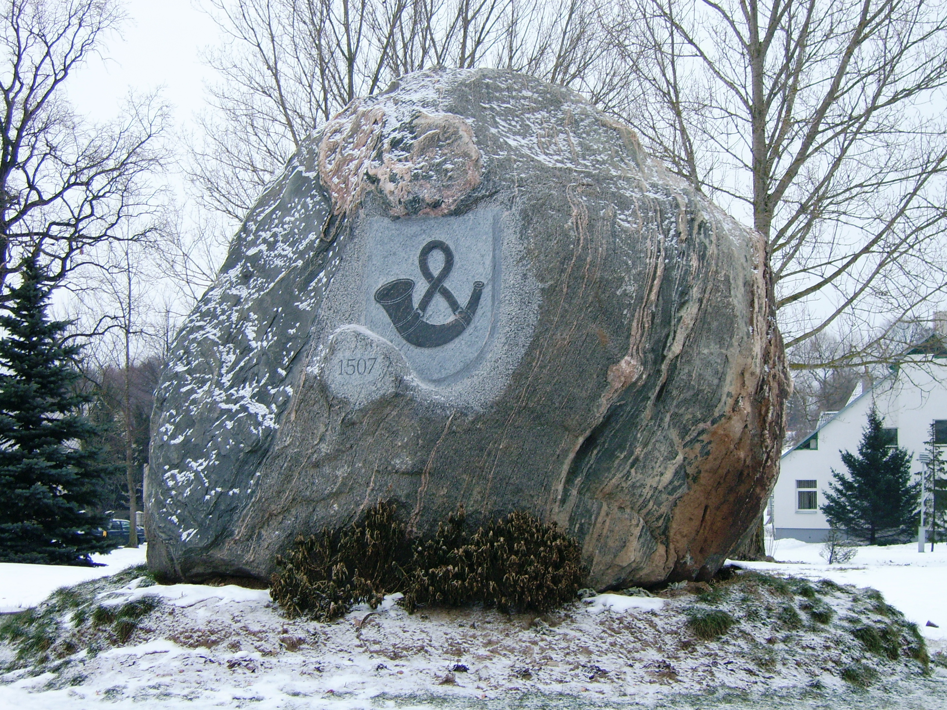 Akmuo Tauragės 500 metų jubiliejui pažymėti